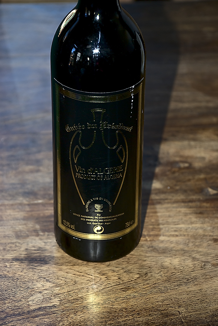 Vin d'Algérie commercialisé par l'ONCV